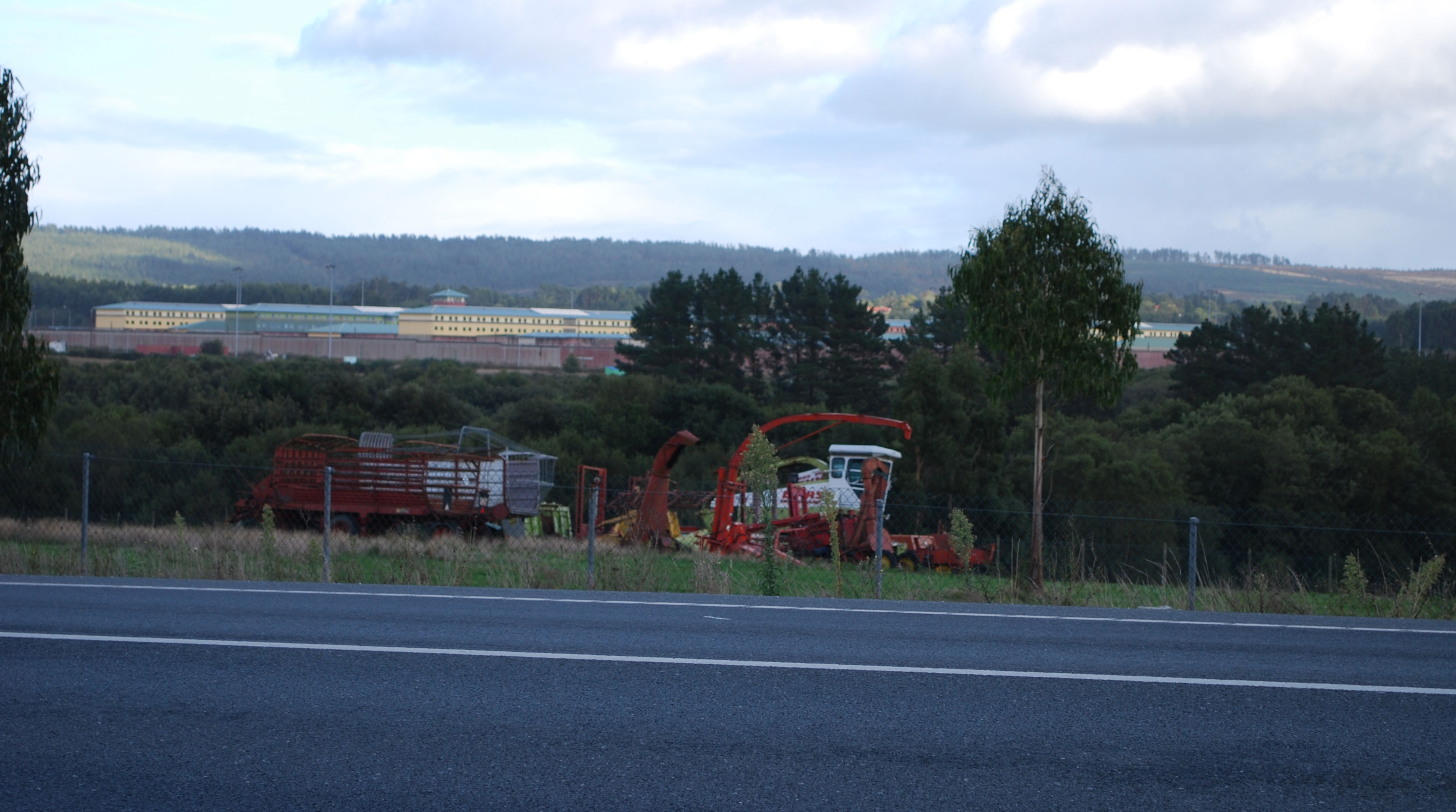 Vista do Centro penitenciario de Teixeiro dende a estrada N 634 Galiza